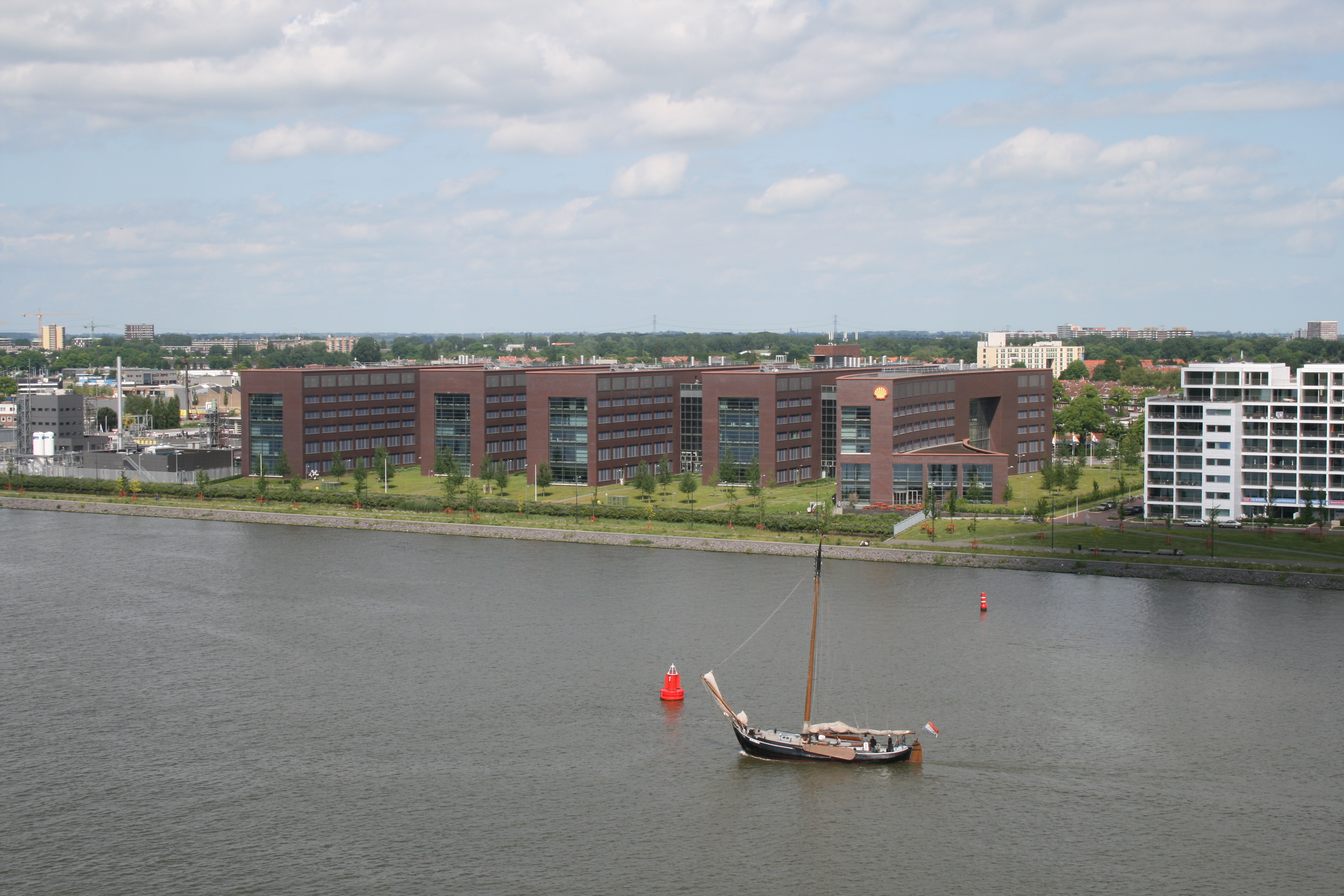 Shell New Technology Centre, gezien vanaf gebouw IJdock, 2 juni 2012